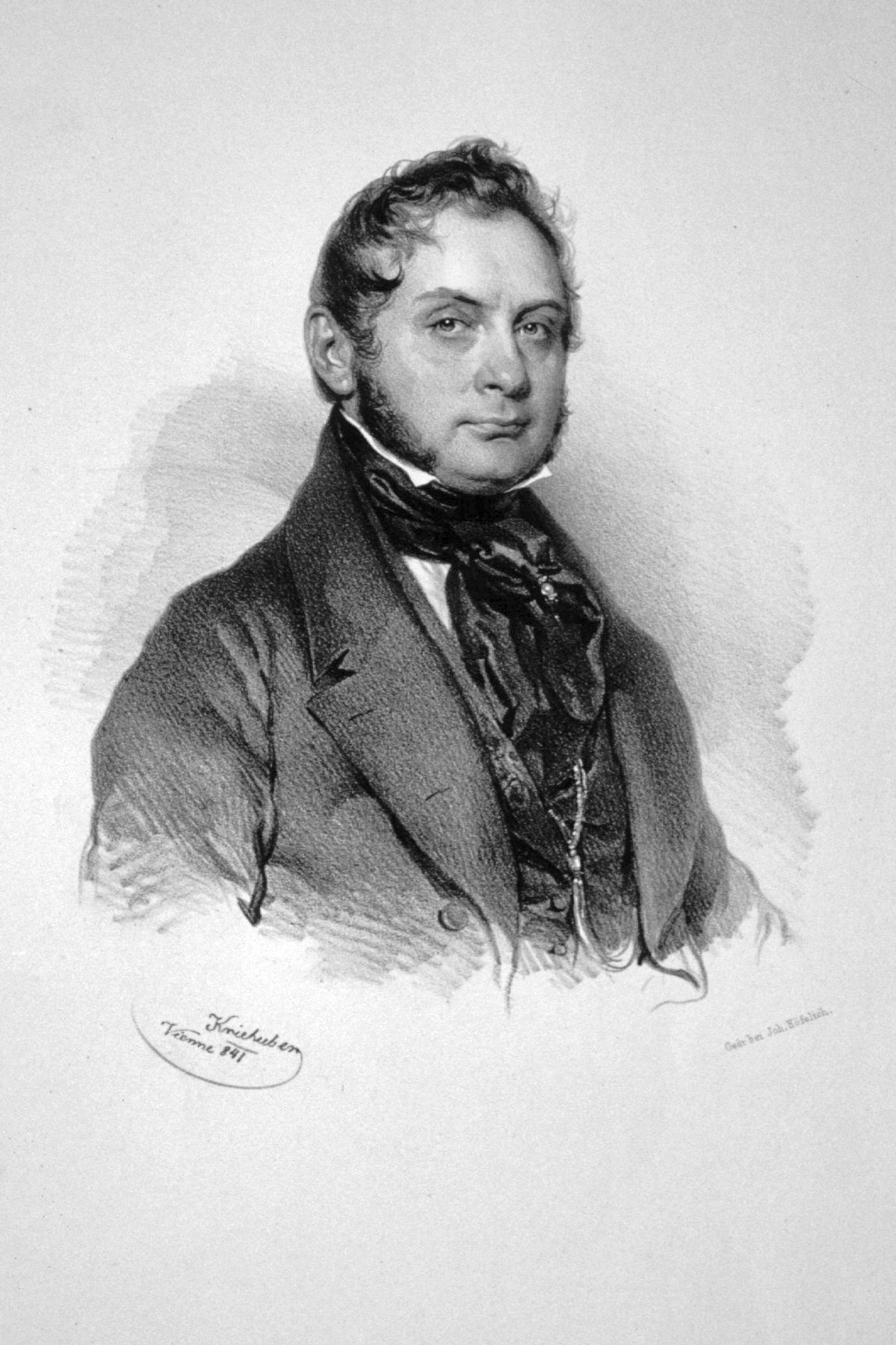 Moritz Karl Wilhelm Graf von Strachwitz (1822-1847), deutscher Dichter Lithographie von Josef Kriehuber, 1841